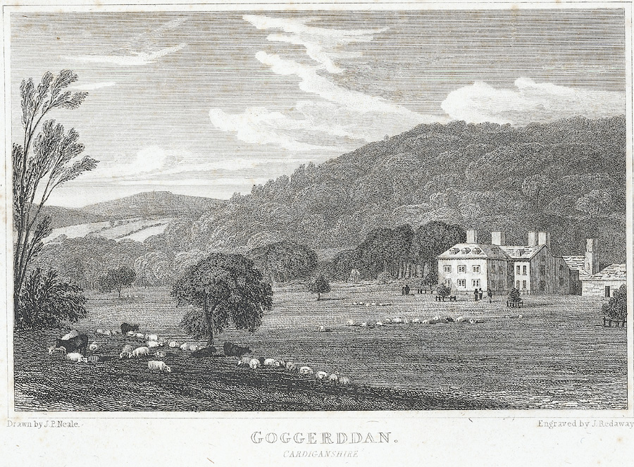 Mansion.